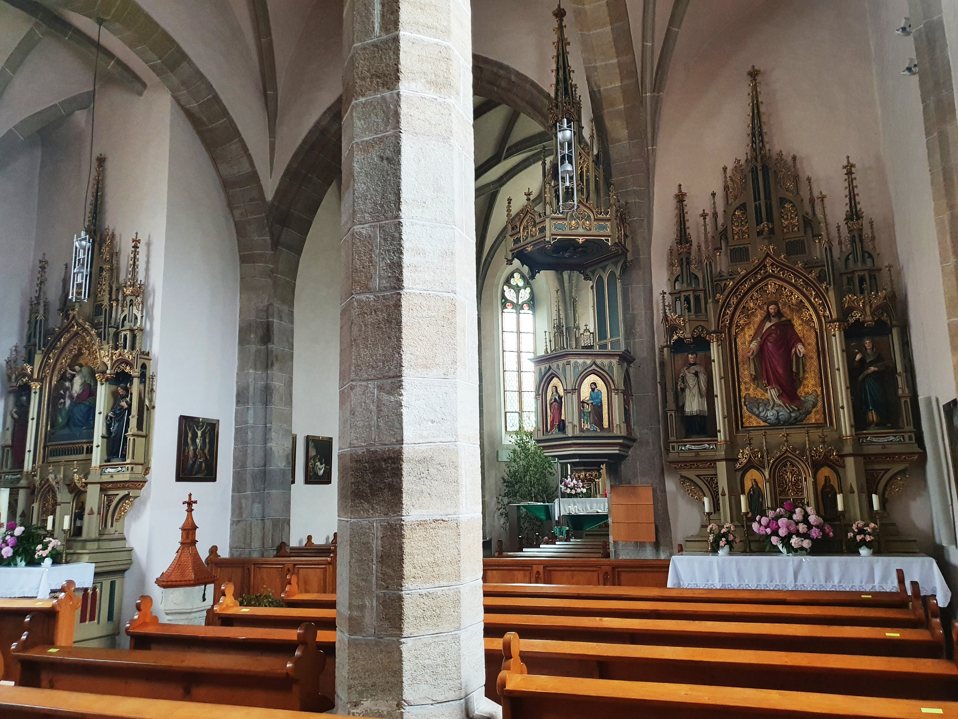 Nördliches ebenerdiges Turmgeschoss im Langhaus mit neugotischen Altären von 1871